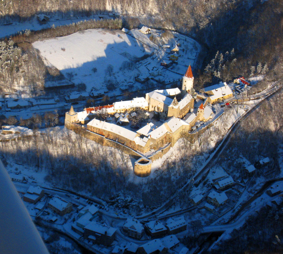 Hrad Křivoklát na ostrohu nad Rakovnickým potokem a částí městyse Křivoklát.